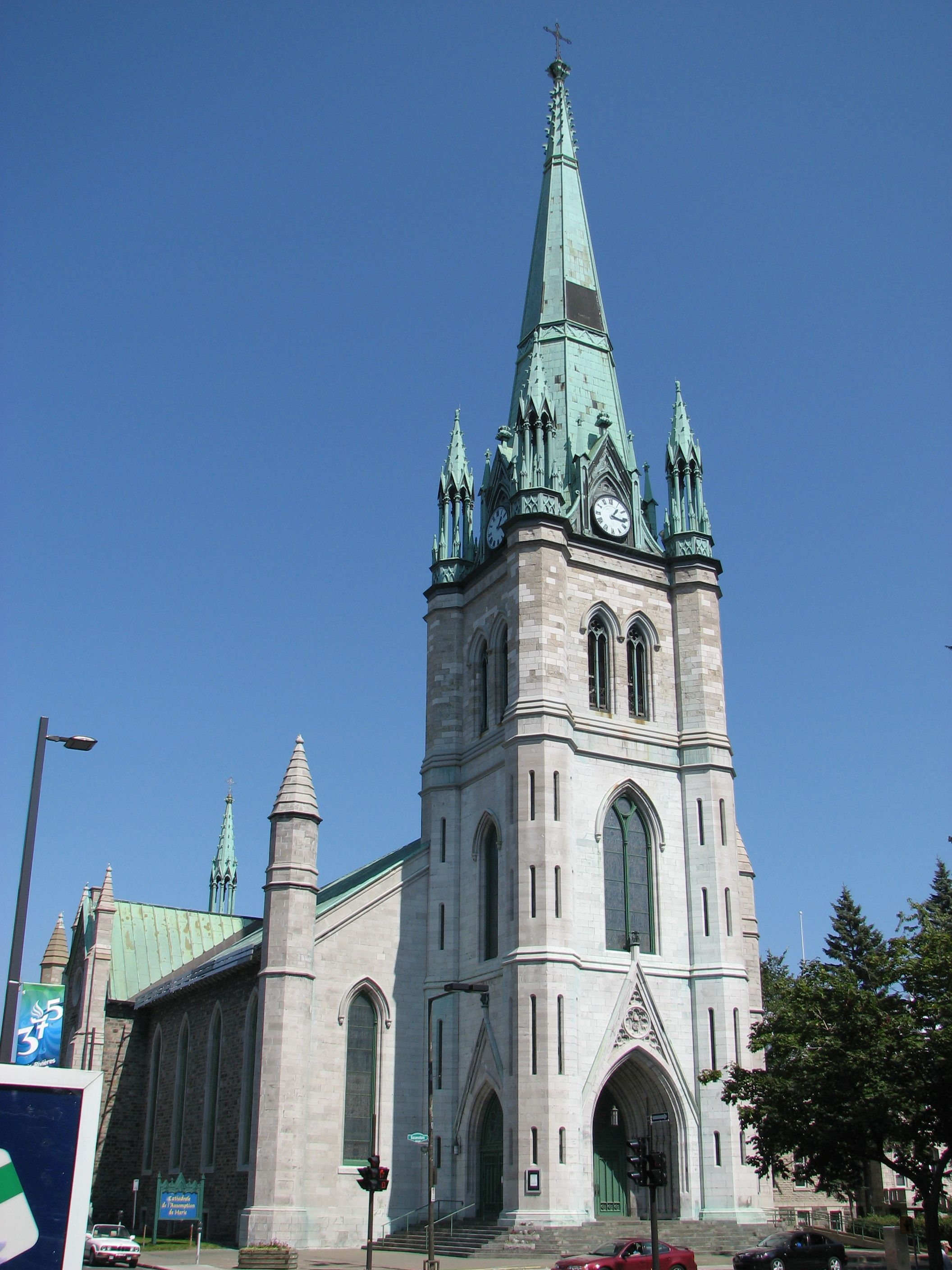 Cathédrale de Trois-Rivières (Québec)